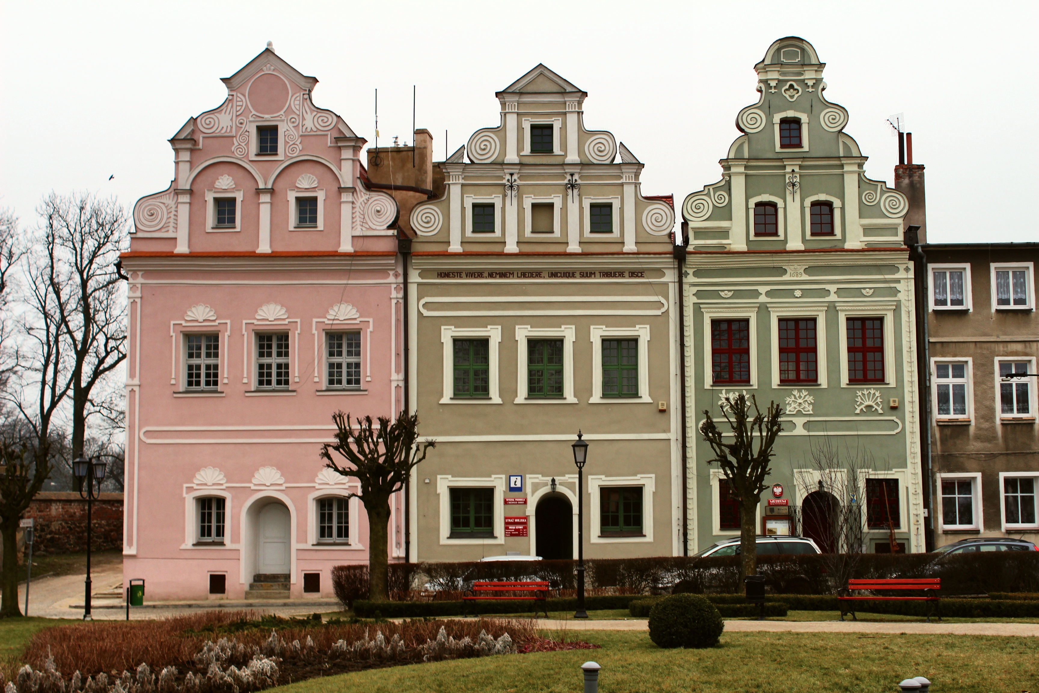 Wschowa, dom, XVI, 1689